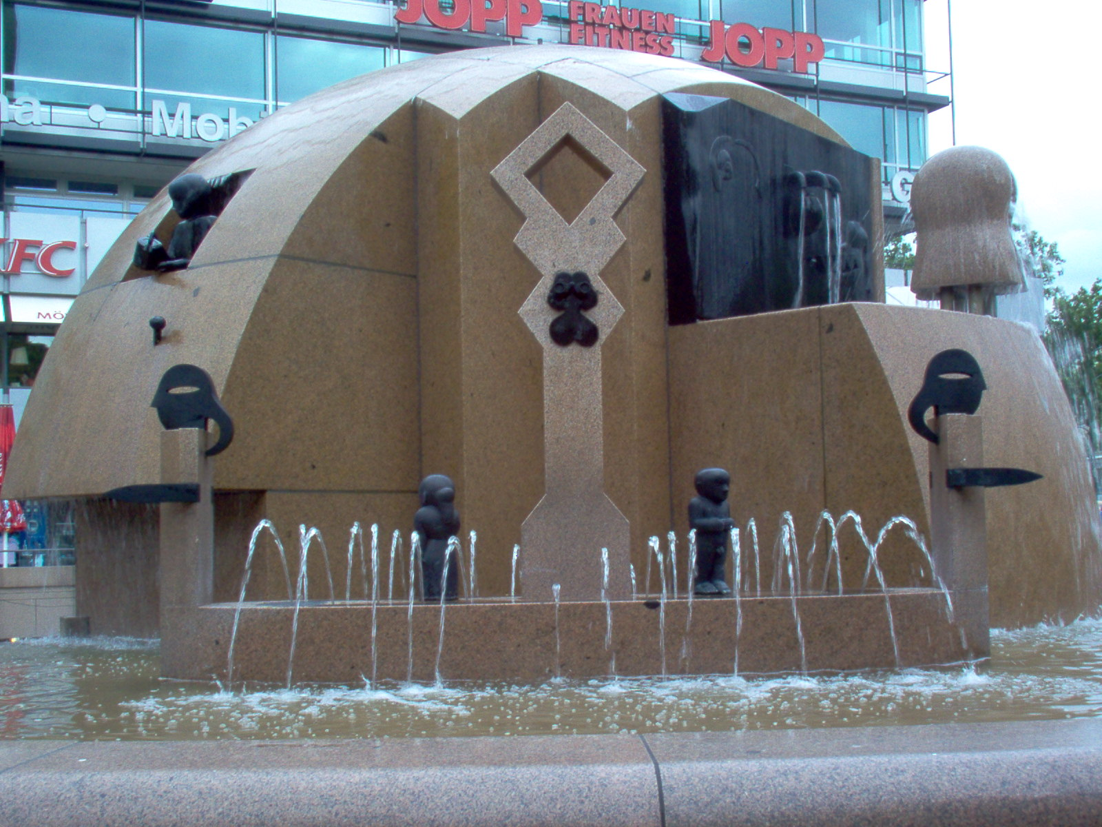 Weltkugelbrunnen in front of Europa-Center